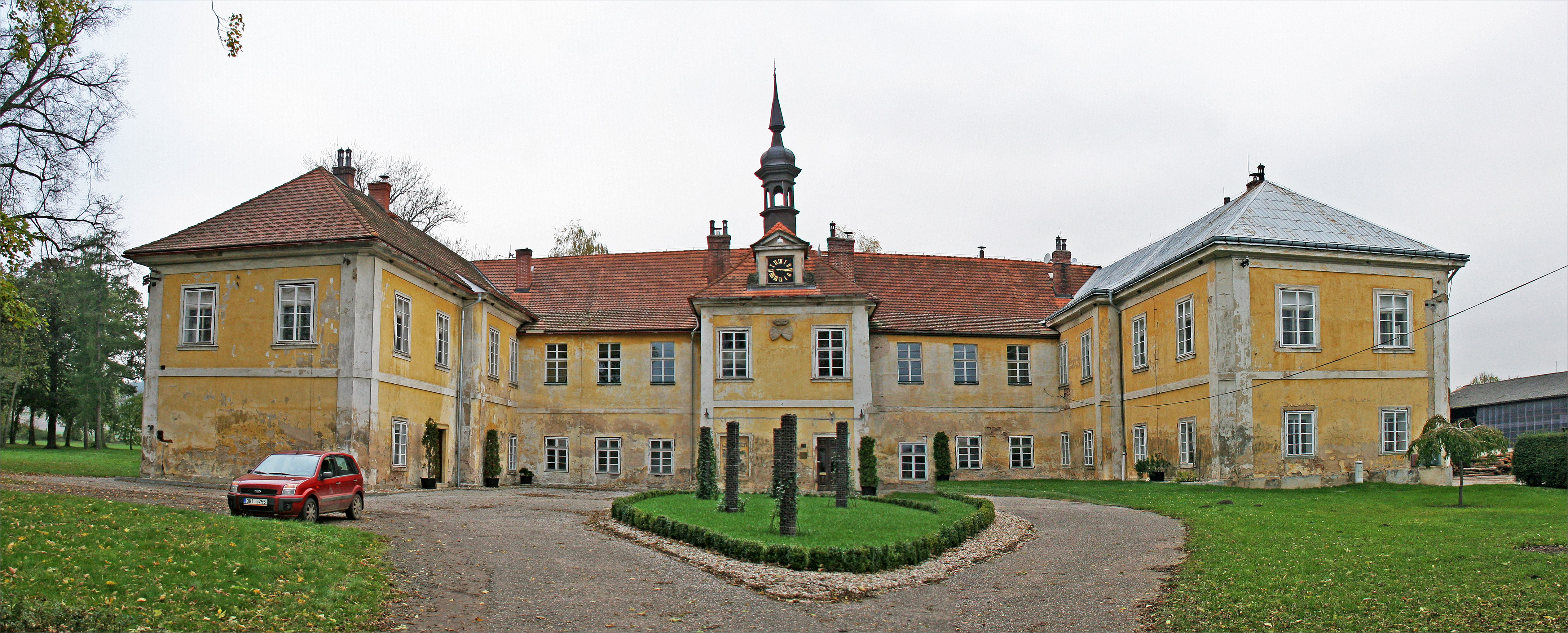 Zámek Vokšice, Vokšice 1, Vokšice